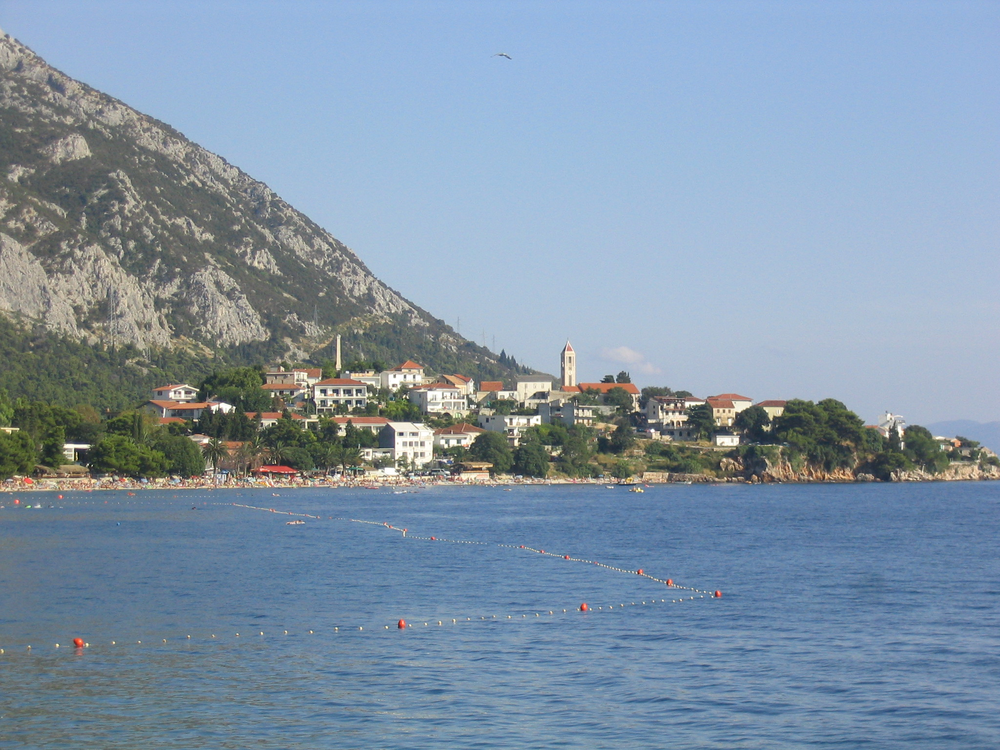 Gradac von der Promenade nach Brist aus gesehen, aufgenommen am 11.08.2006 von Dr. Hagen Graebner